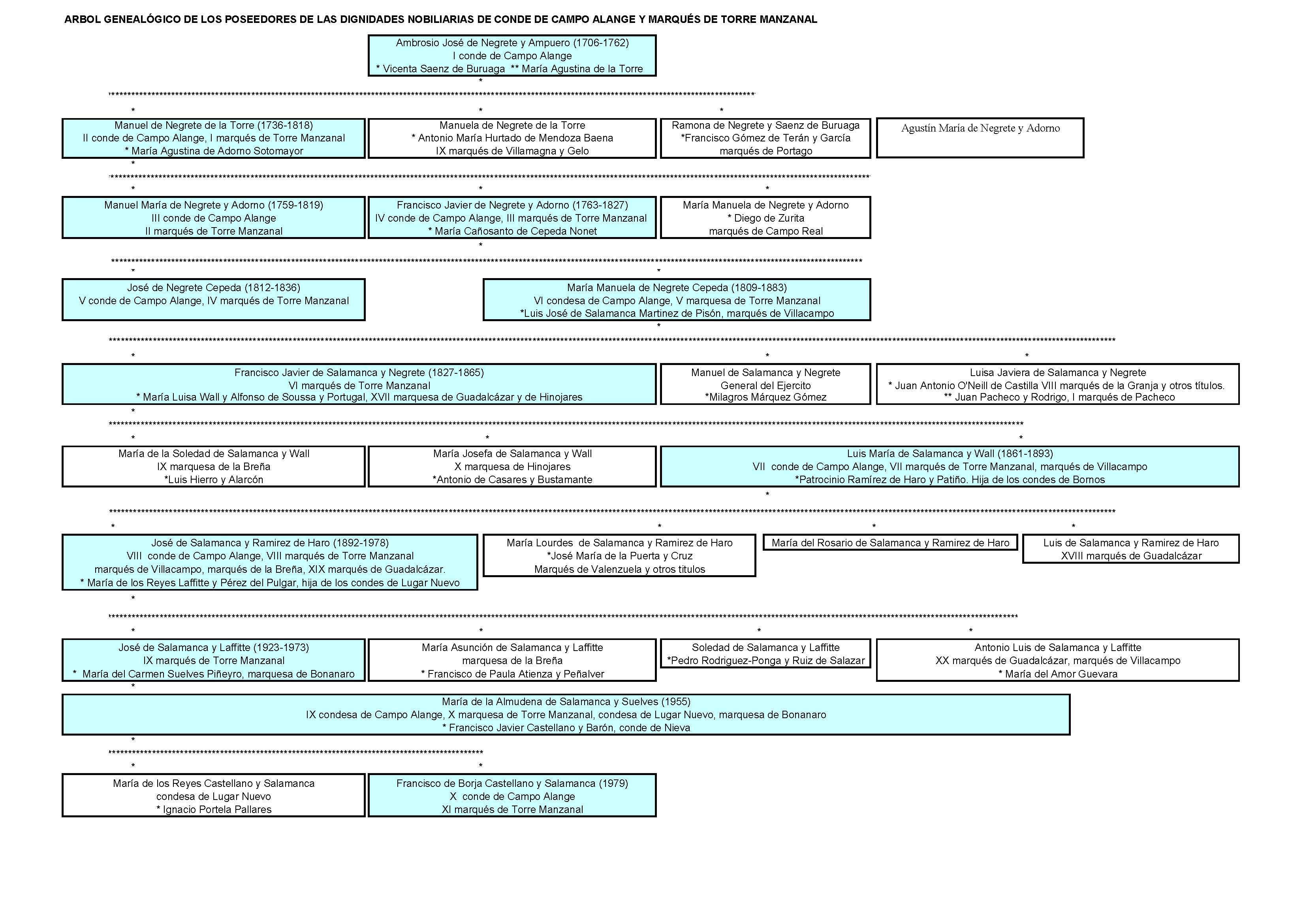 Árbol genealógico de la sucesión del título Conde del Campo de Alange y Marqués de Torre Manzanal